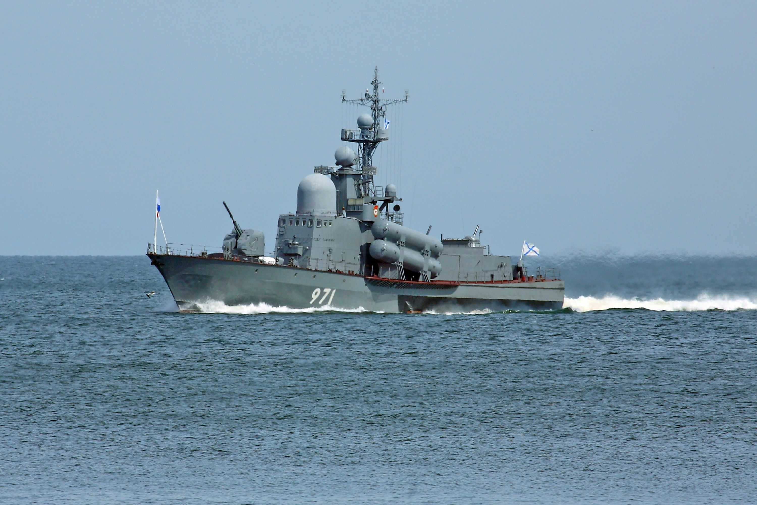 РКА Р-298 в Амурском Заливе 2011.07.31